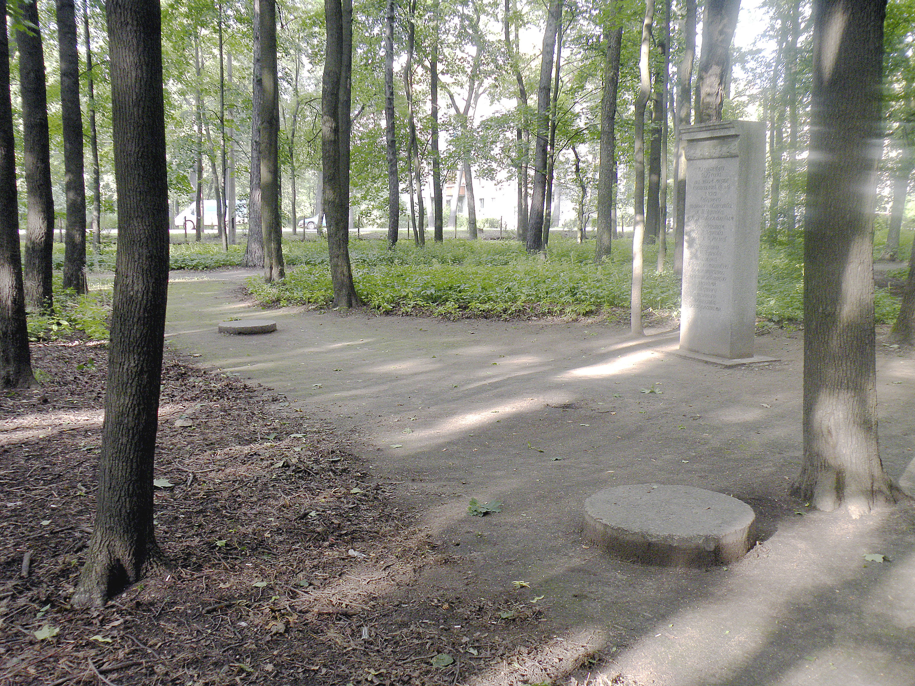 Место дуэли Чернова и Новосильцева